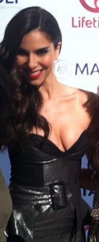 roselyn sanchez pour devious maids